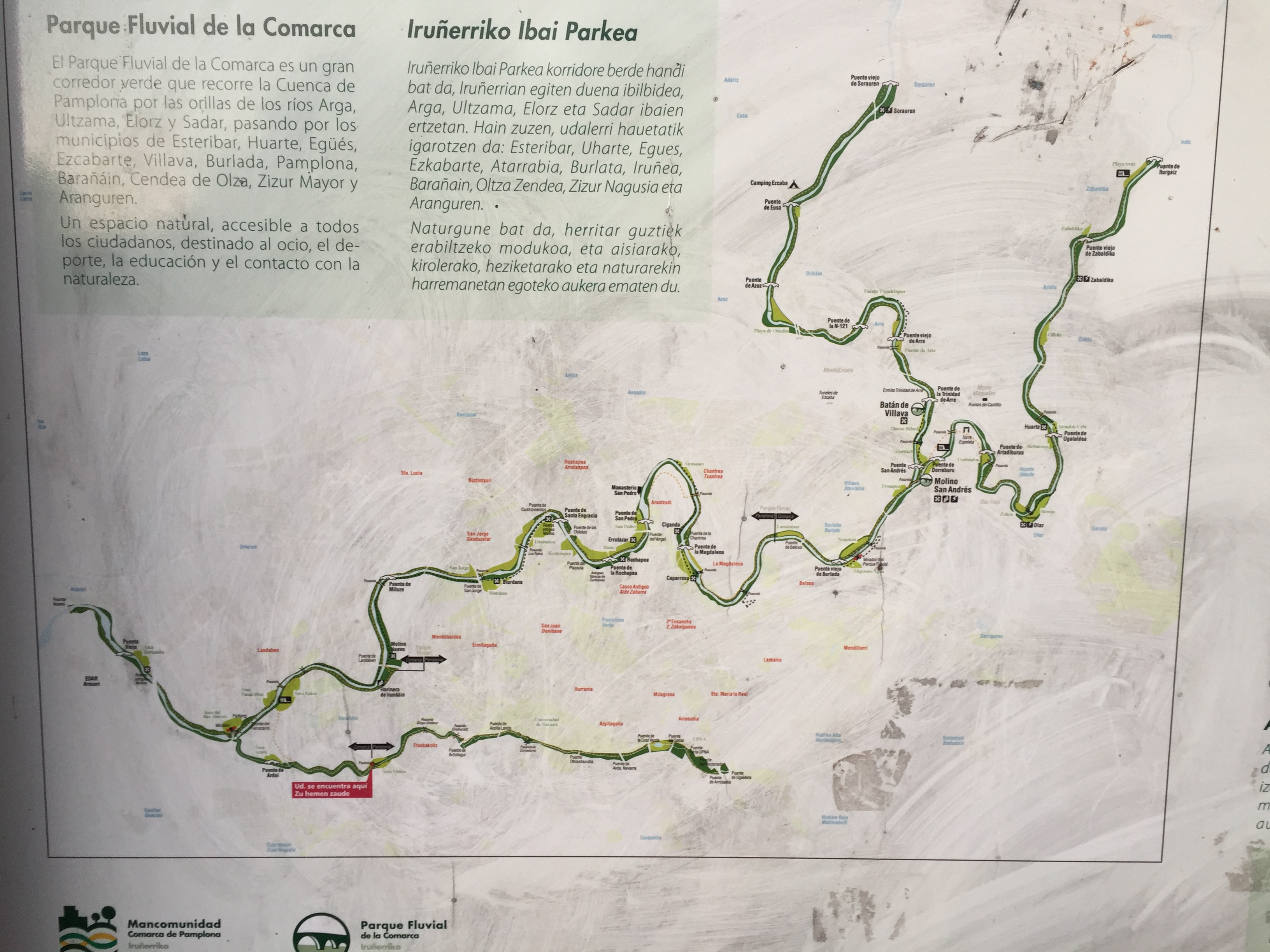 Iruñerriko ibai parkeko mapa